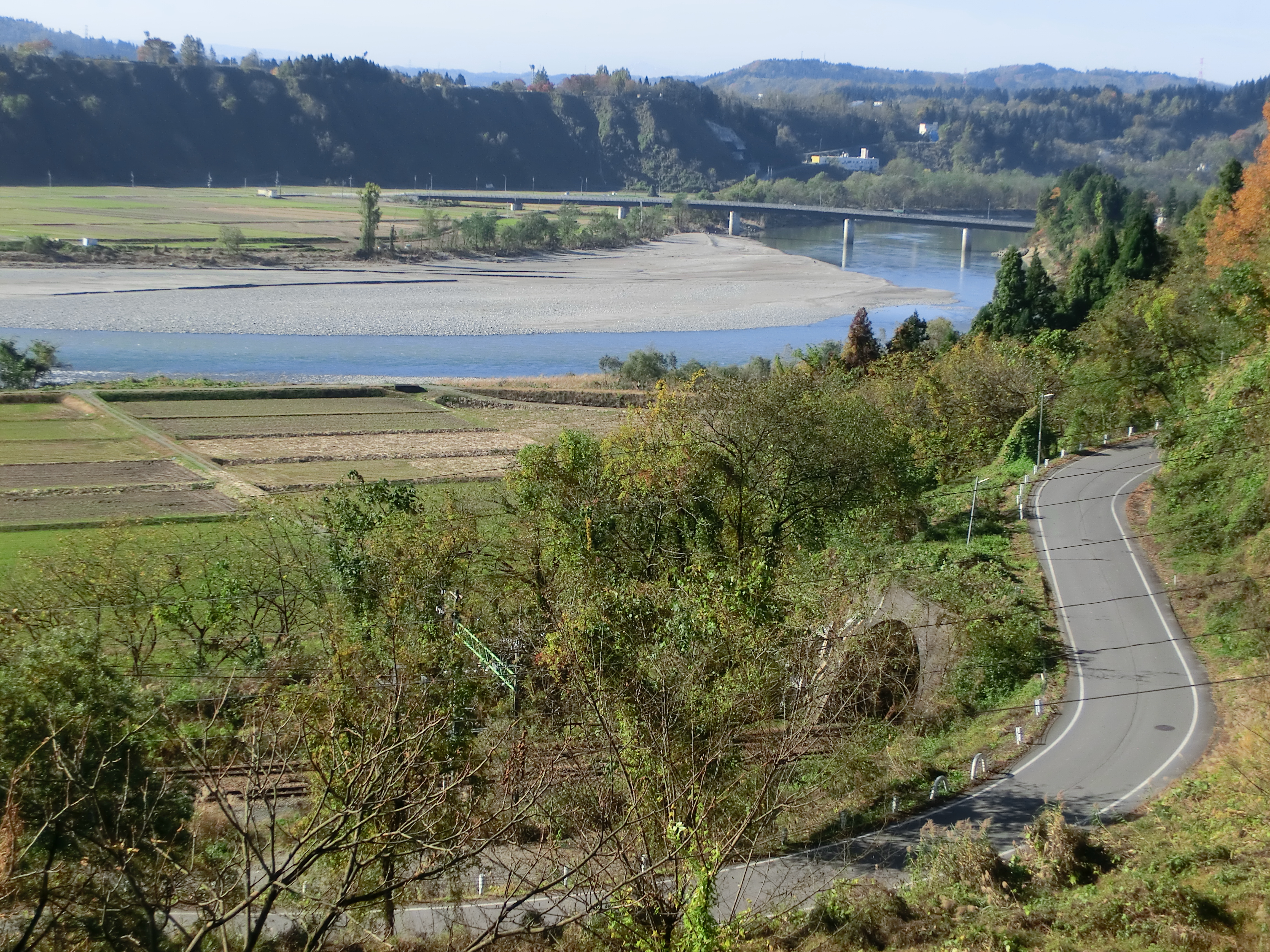 この画像は2017年11月10日投稿者によって、新潟県長岡市川口牛ケ島（国道17号線車道外上）にて撮影された、信濃川に架かっている牛ケ島大橋の写真。手前に見える線路は上越線。